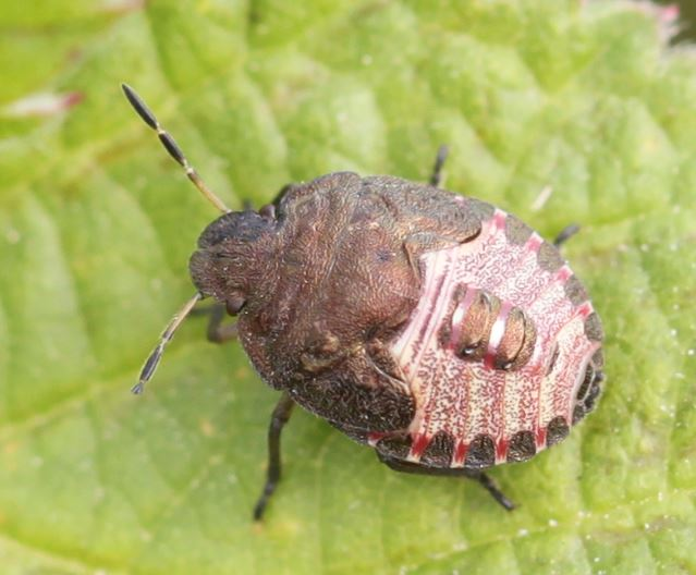 Letztes Nymphenstadium von Peribalus strictus, am 13. September 2018 in Walldorf/Baden, 6 Tage vor der letzten Häutung zum Imago